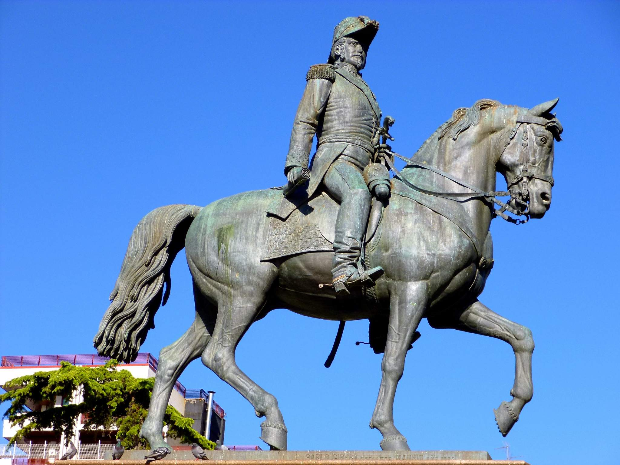 Monumento a Espartero, en el Parque del Espolón de Logroño